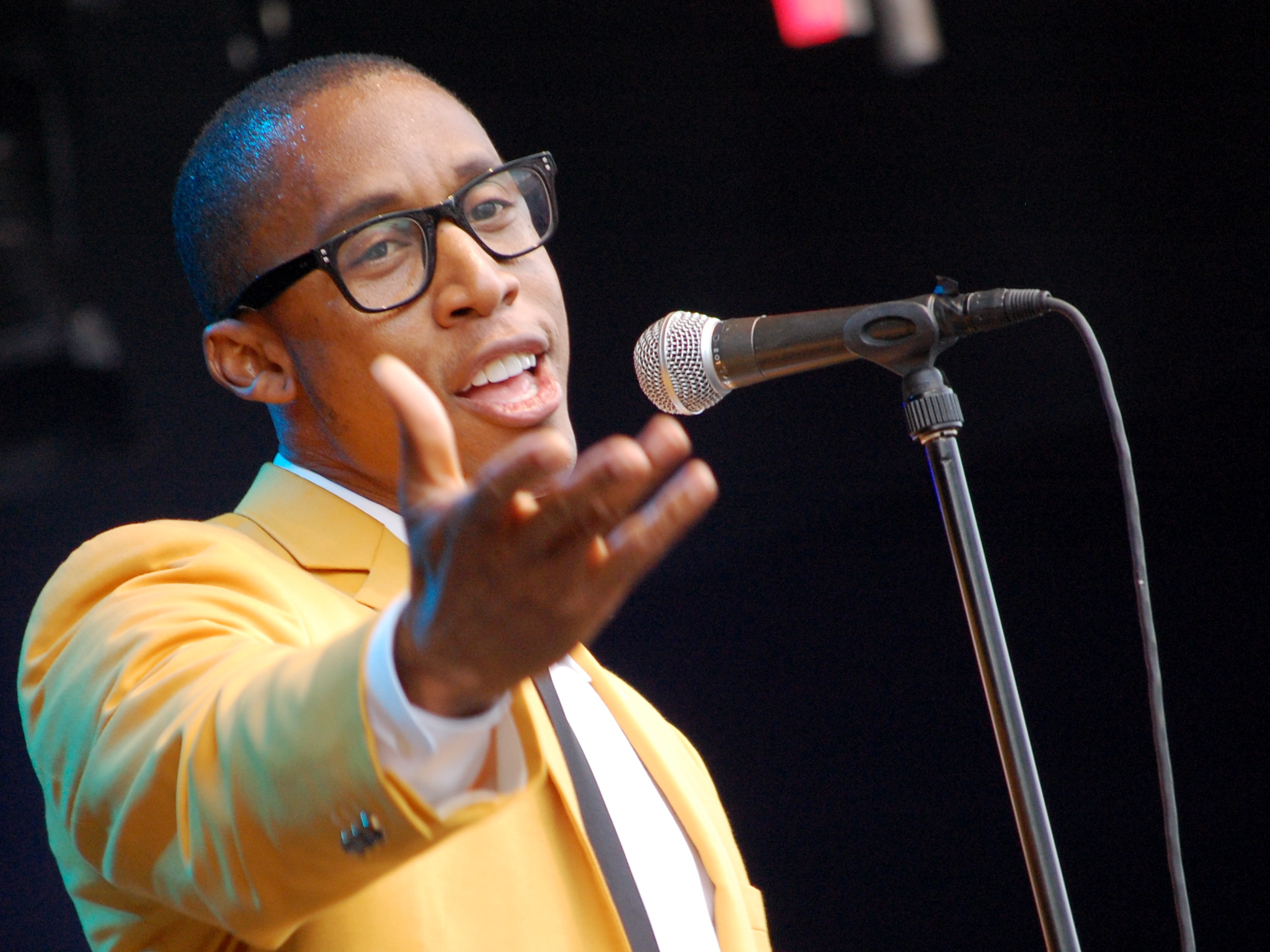 Raphael Saadiq performing at the 2009 Stockholm Jazz Festival, Stockholm, Sweden.